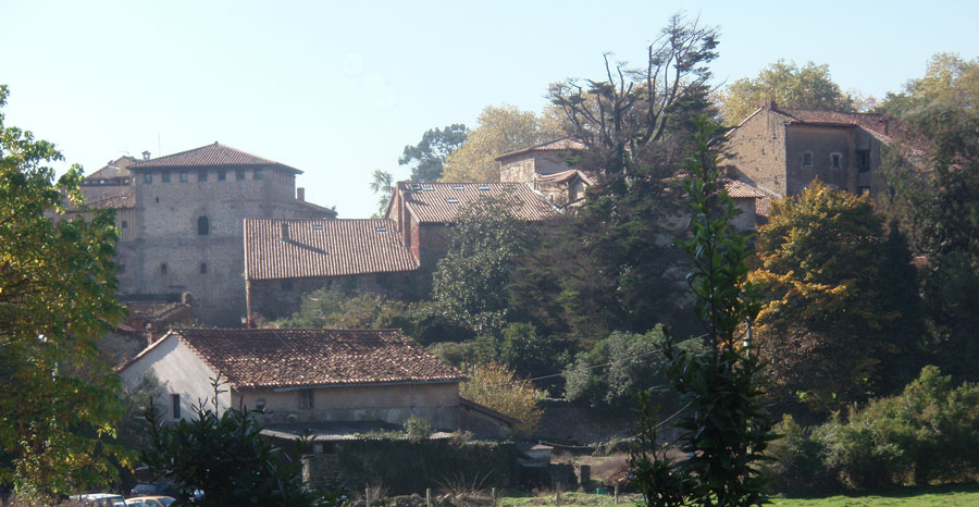 Vista de Santillana del Mar (Cantabria, España).